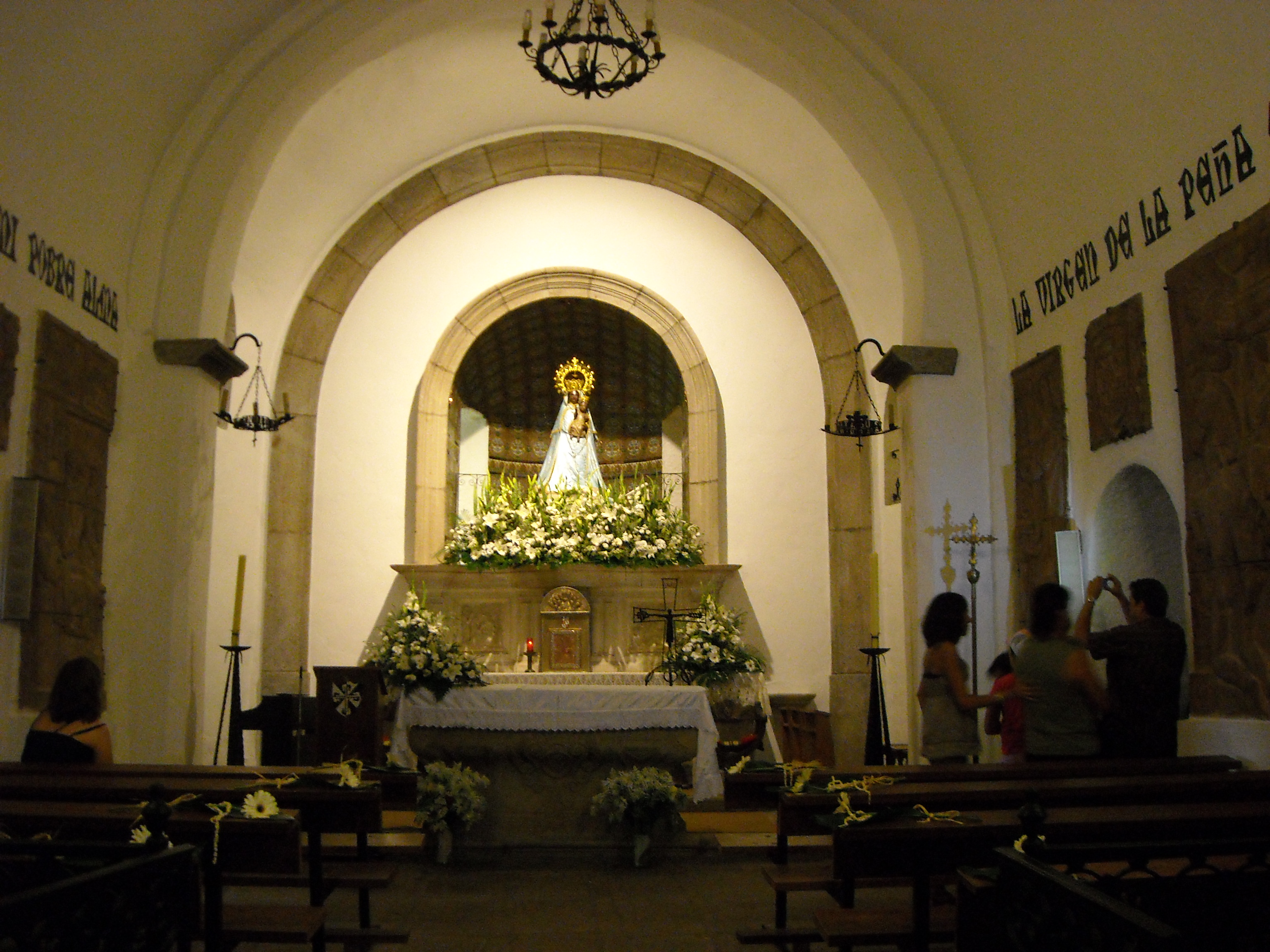 Santuario de Nuestra Señora de la Peña de Francia, El Cabaco, Salamanca, España